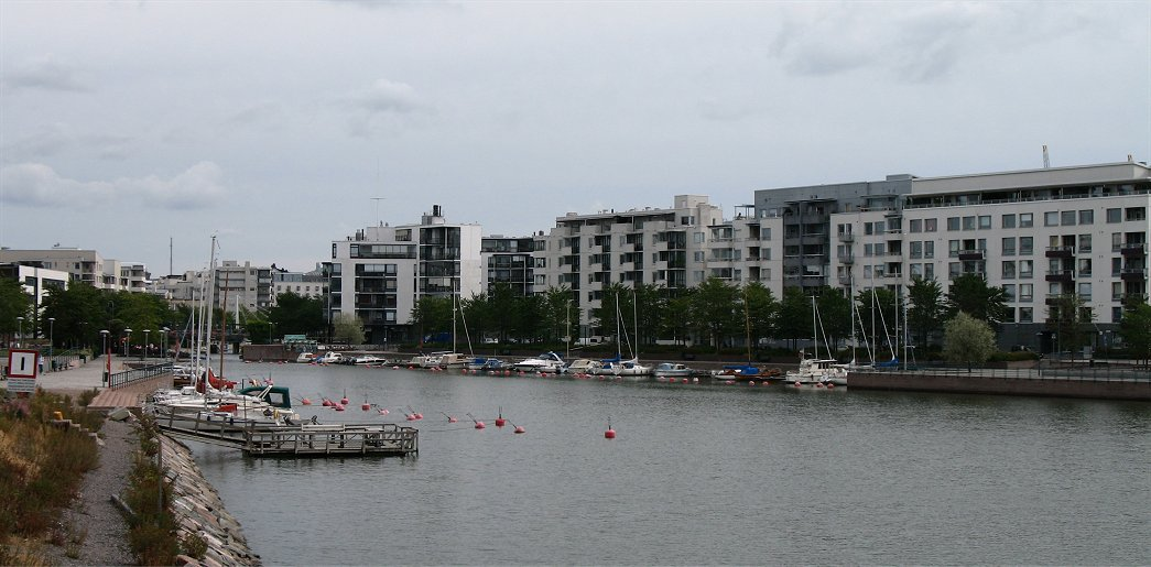 Ruoholahti channel and buildings of northern Jätkäsaari district of Helsinki, Finland. (In Finnish: Ruoholahden kanavaa ja Jätkäsaaren pohjoisrannan asuintaloja, Helsinki)